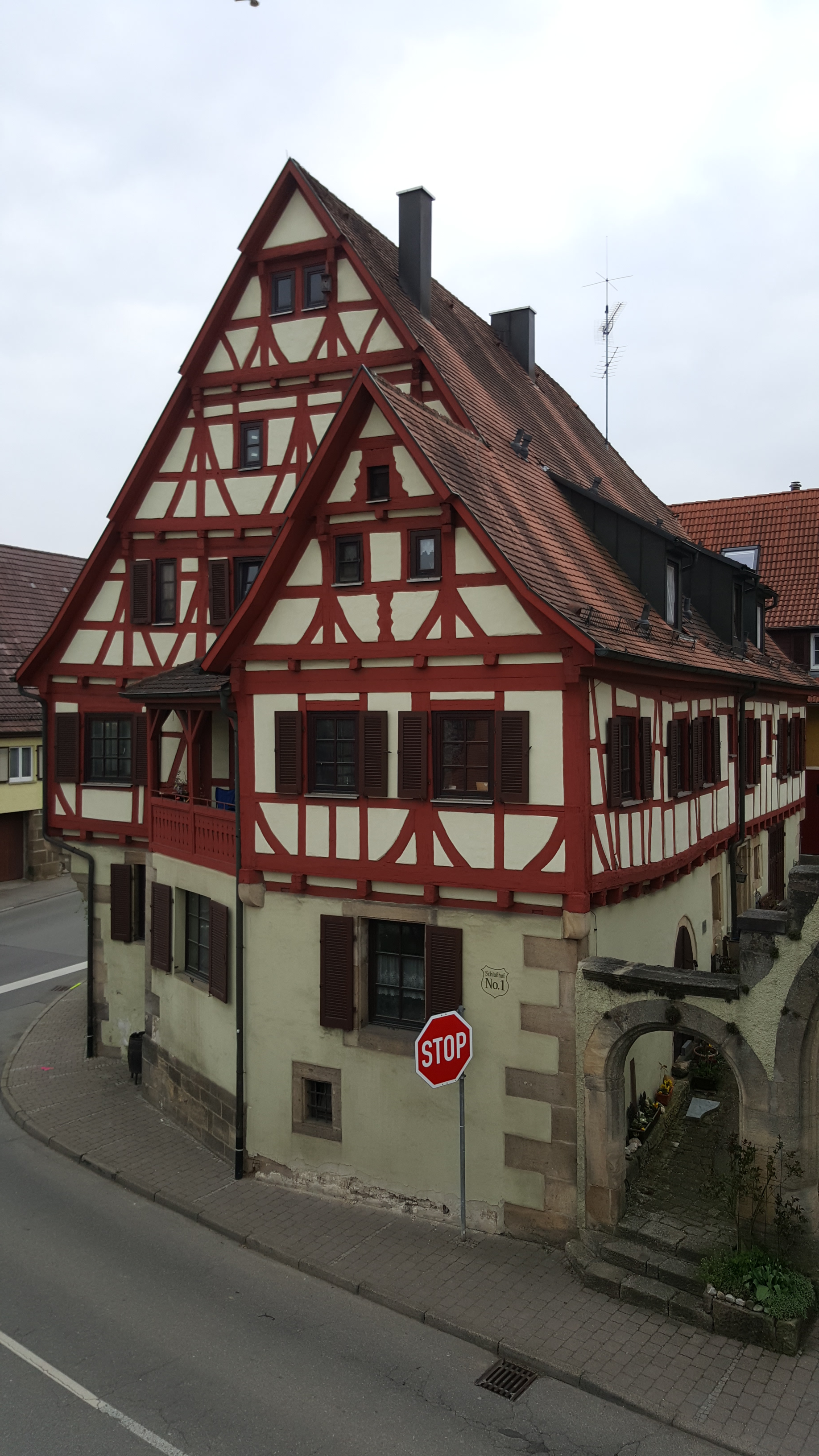 72141 Walddorfhäslach Schlosshof